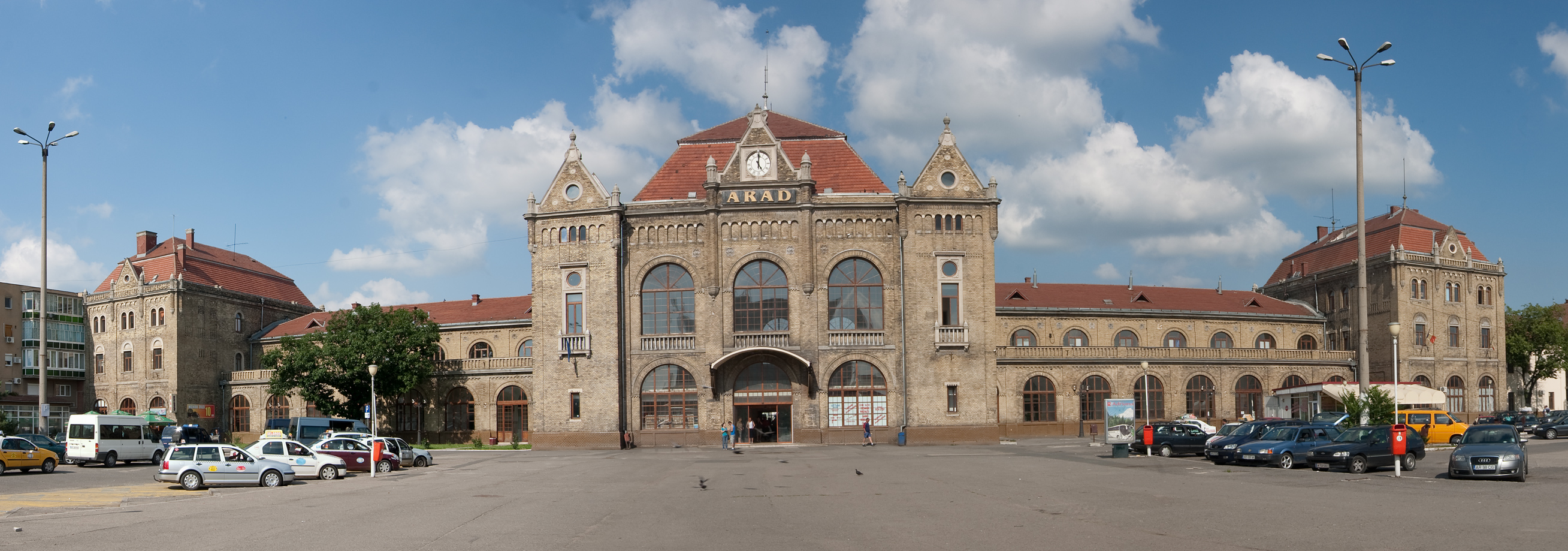 Hauptbahnhof in Arad, Rumänien